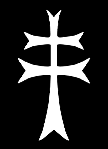 Saint Esprit